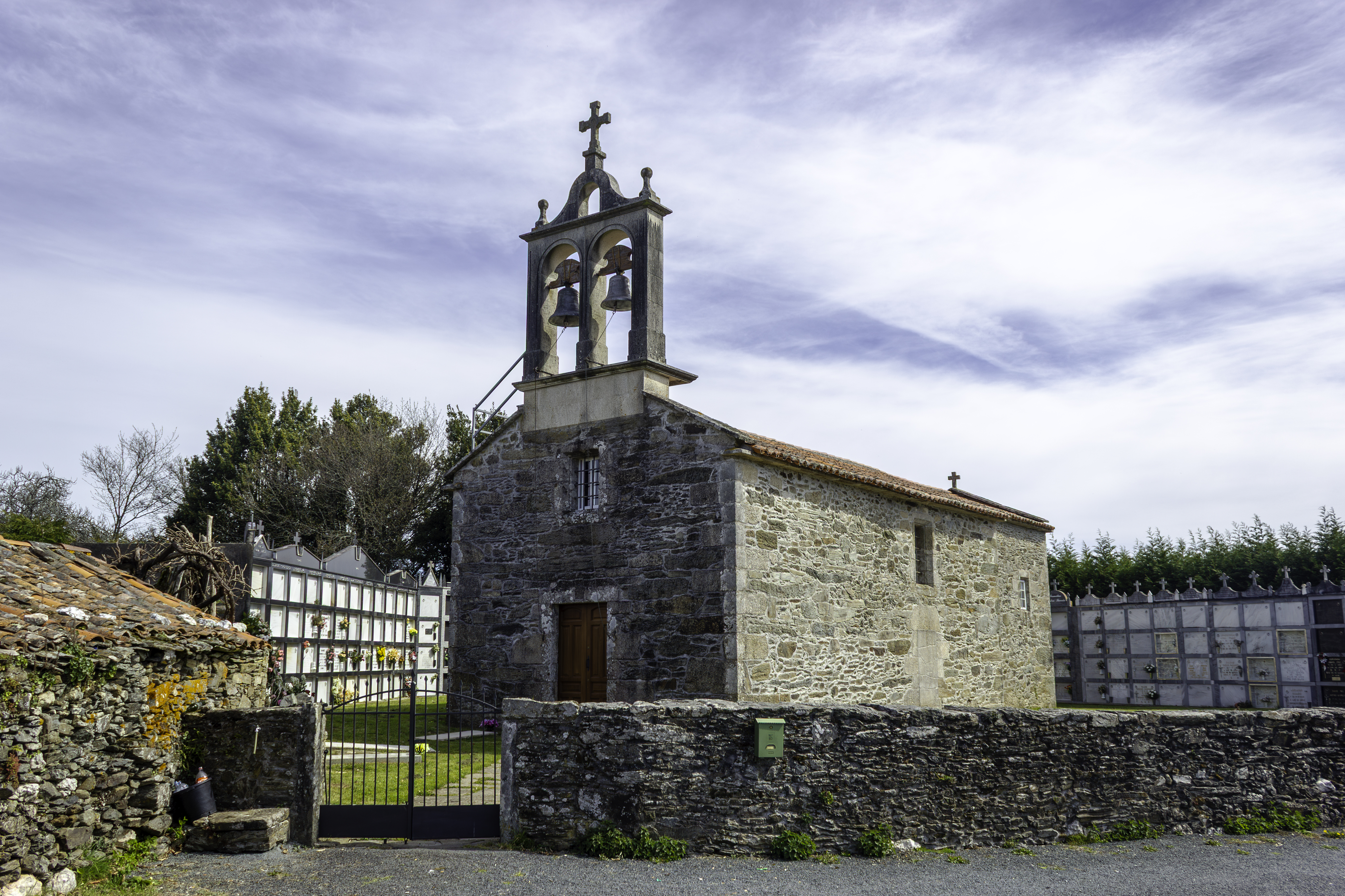 Igrexa de Santa María de Maroxo, no concello de Arzúa.